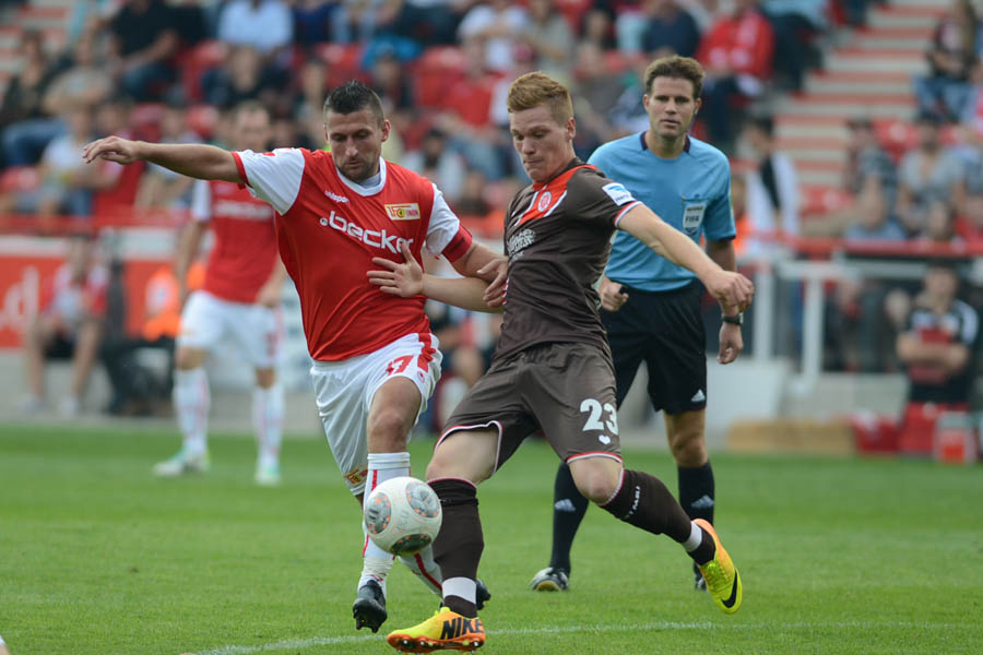 Torsten Mattuschka (links) im Duell mit Marcel Halstenberg (rechts); Schiedsrichter Felix Brych beobachtet die Szene.